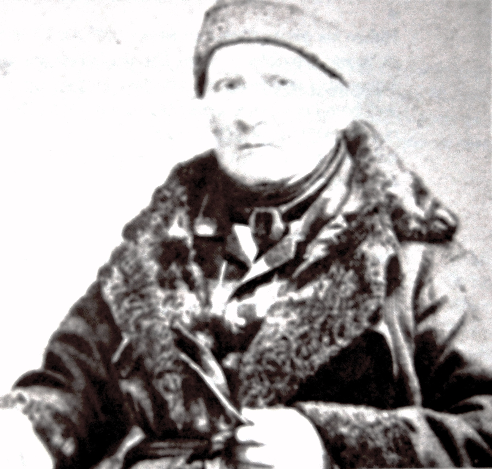 Jonas Budden, letzter Schultheiss und spaeterer Buergermeister von Offenbach am Main